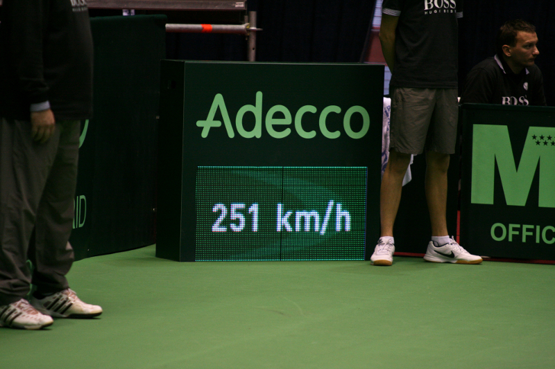 Ivo Karlović postavio je novi svjetski rekord u brzini servisa s 251 km/h tijekom igre parova u 4. setu Davisova kupa 2011. u Zagrebu.